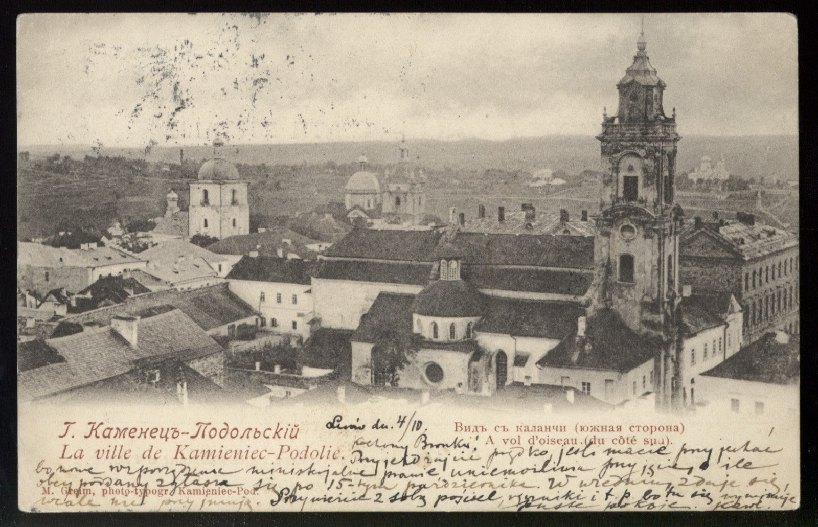 Домініканський кляштор з костелом Св. Миколая. Миколаївський костел з келіями, XIV-XVIII ст., вул. Домiнiканська, 1а